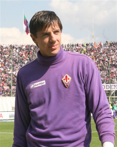 ACF Fiorentina player, Vlada Avramov